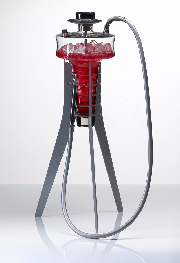 Кальян Shapes Design